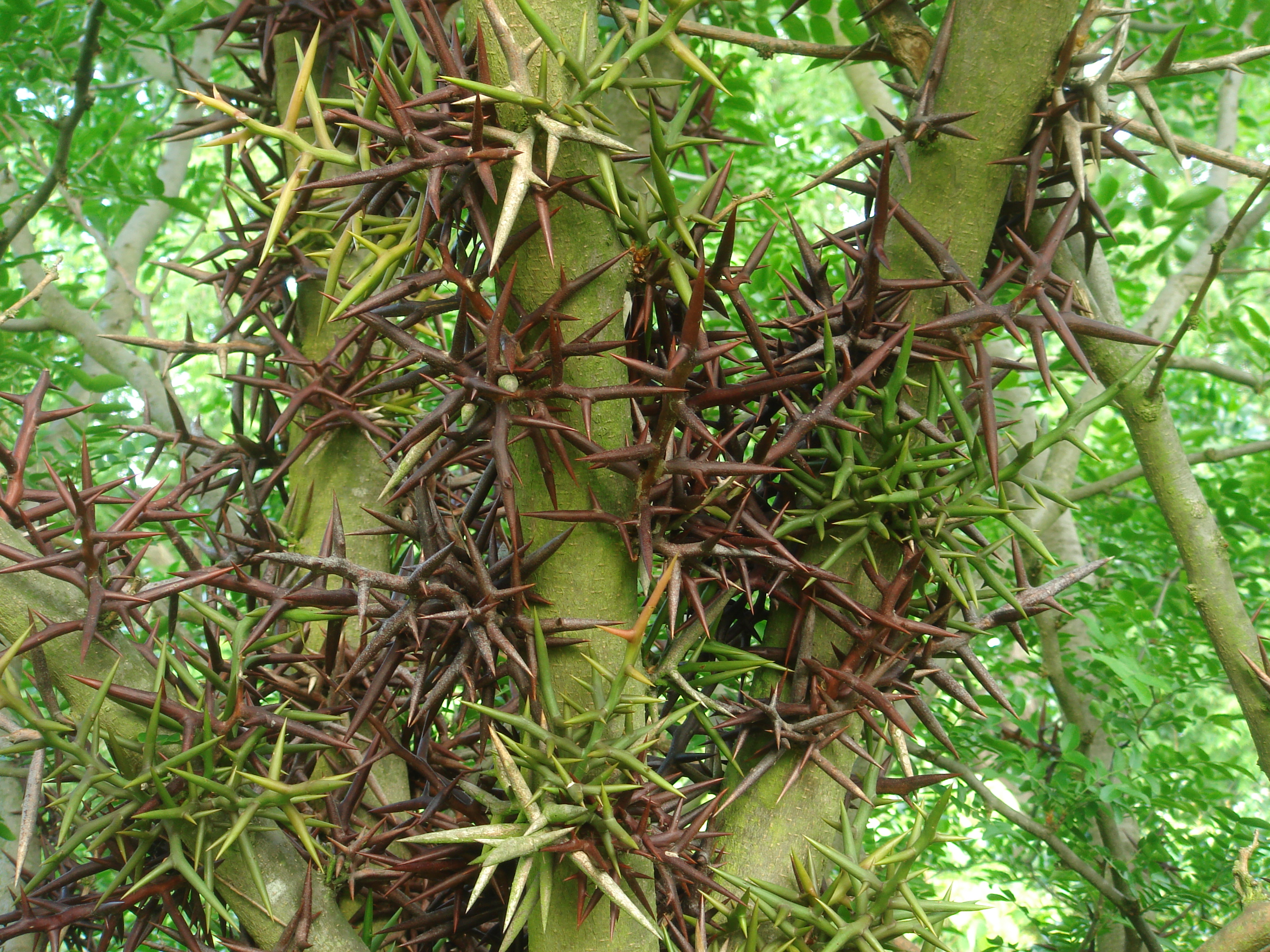 Gledatsia sinensis